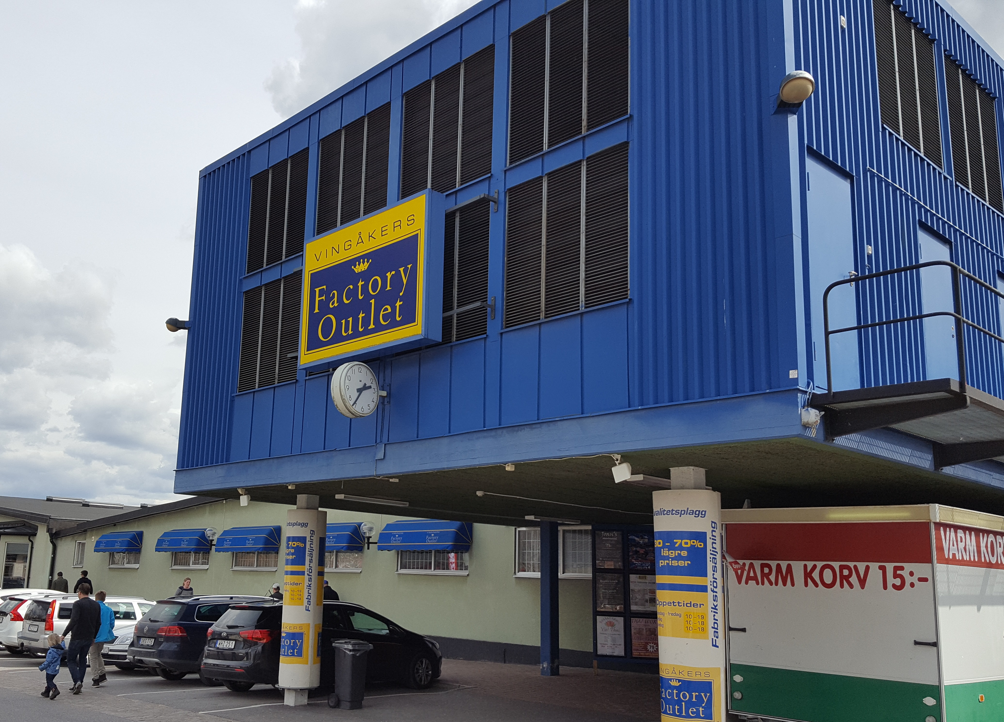 Vingåkers Factory Outlet